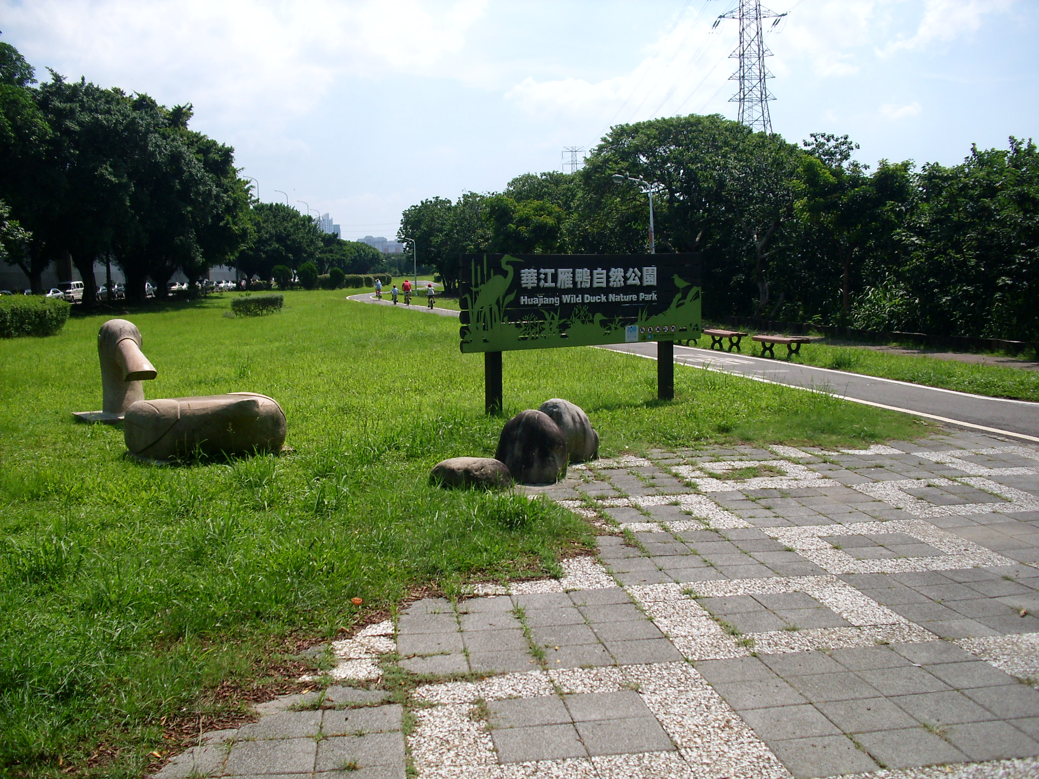 Bân-lâm-gú: 華江雁鴨自然公園入口